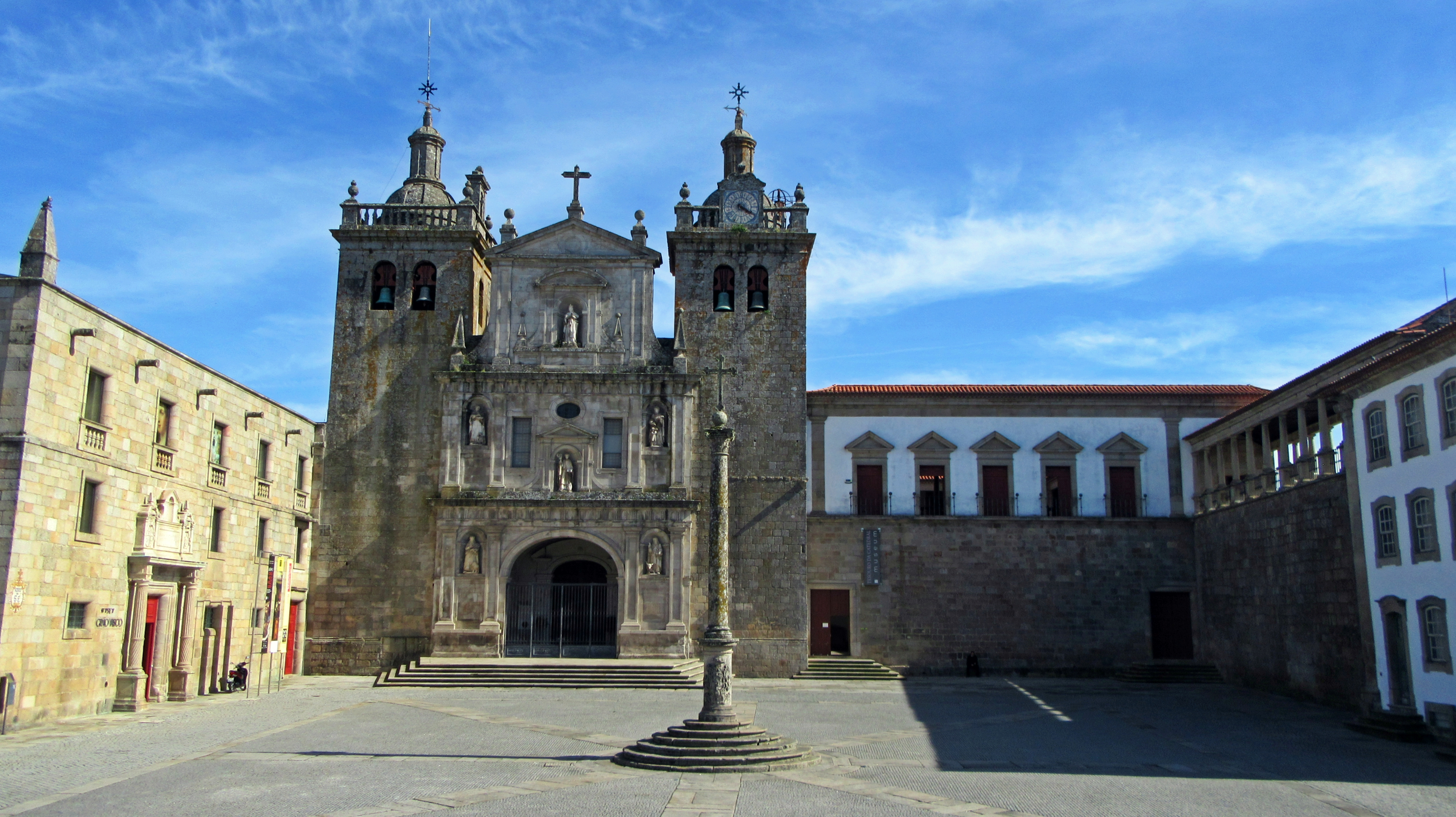 Sé de Viseu